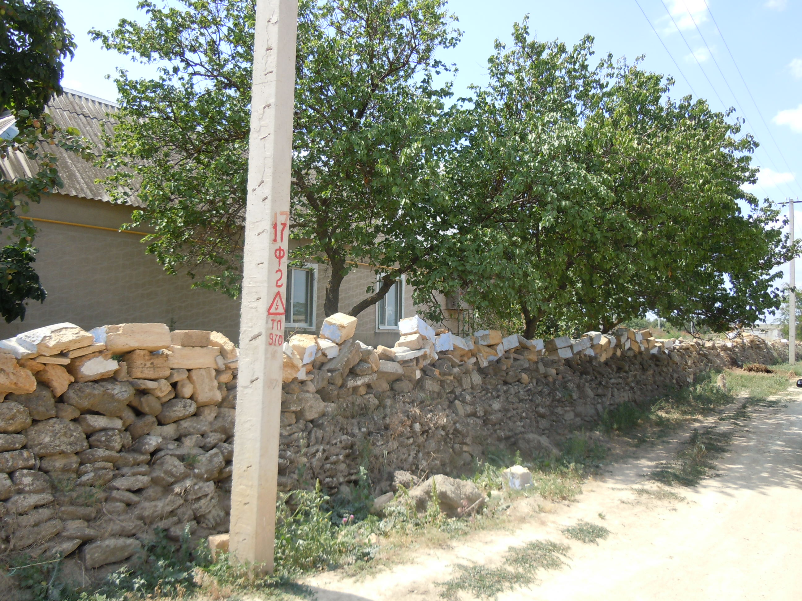 Село Ковалівка, Біляївський район Одеської області